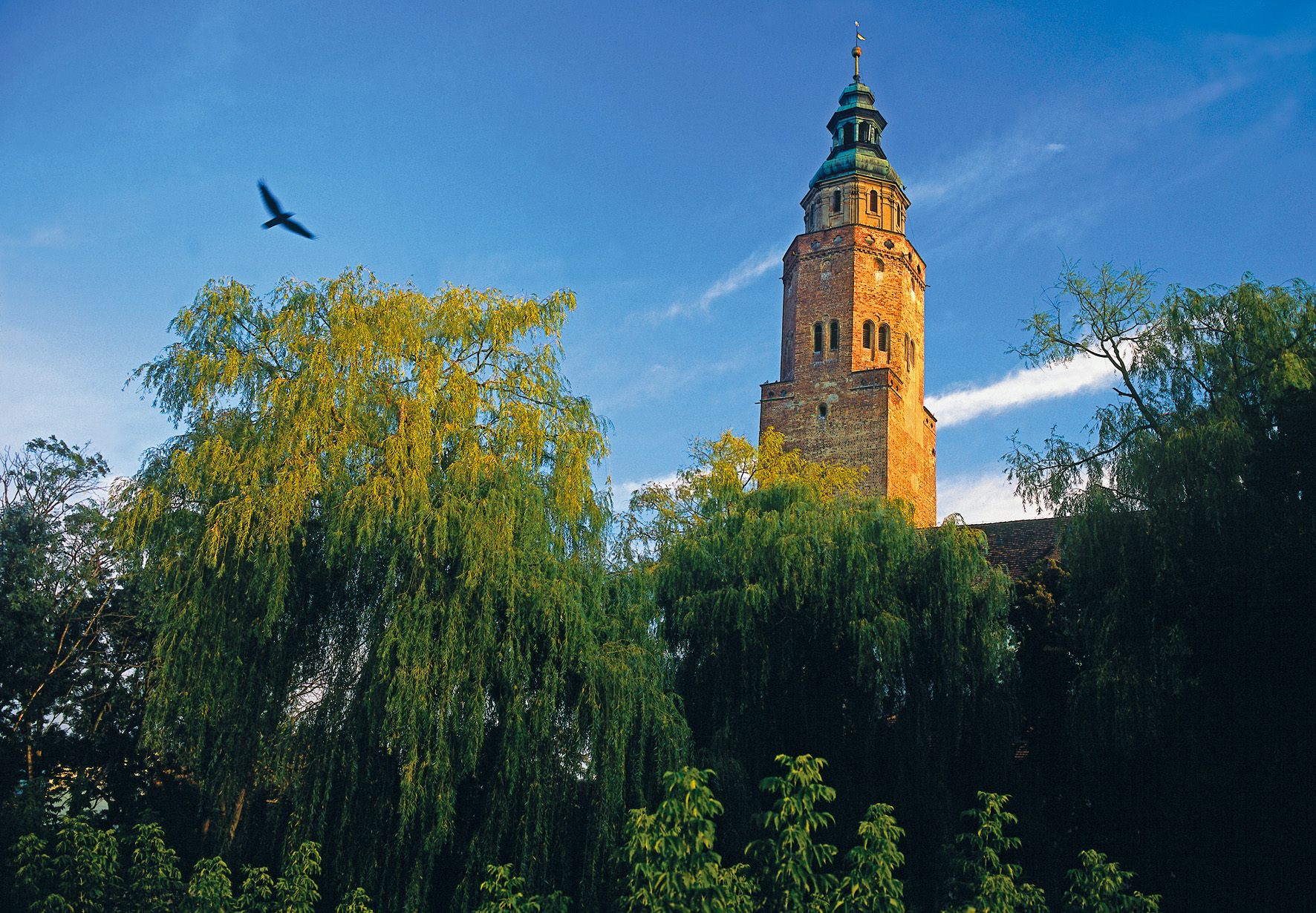 Kościół farny we Wschowie